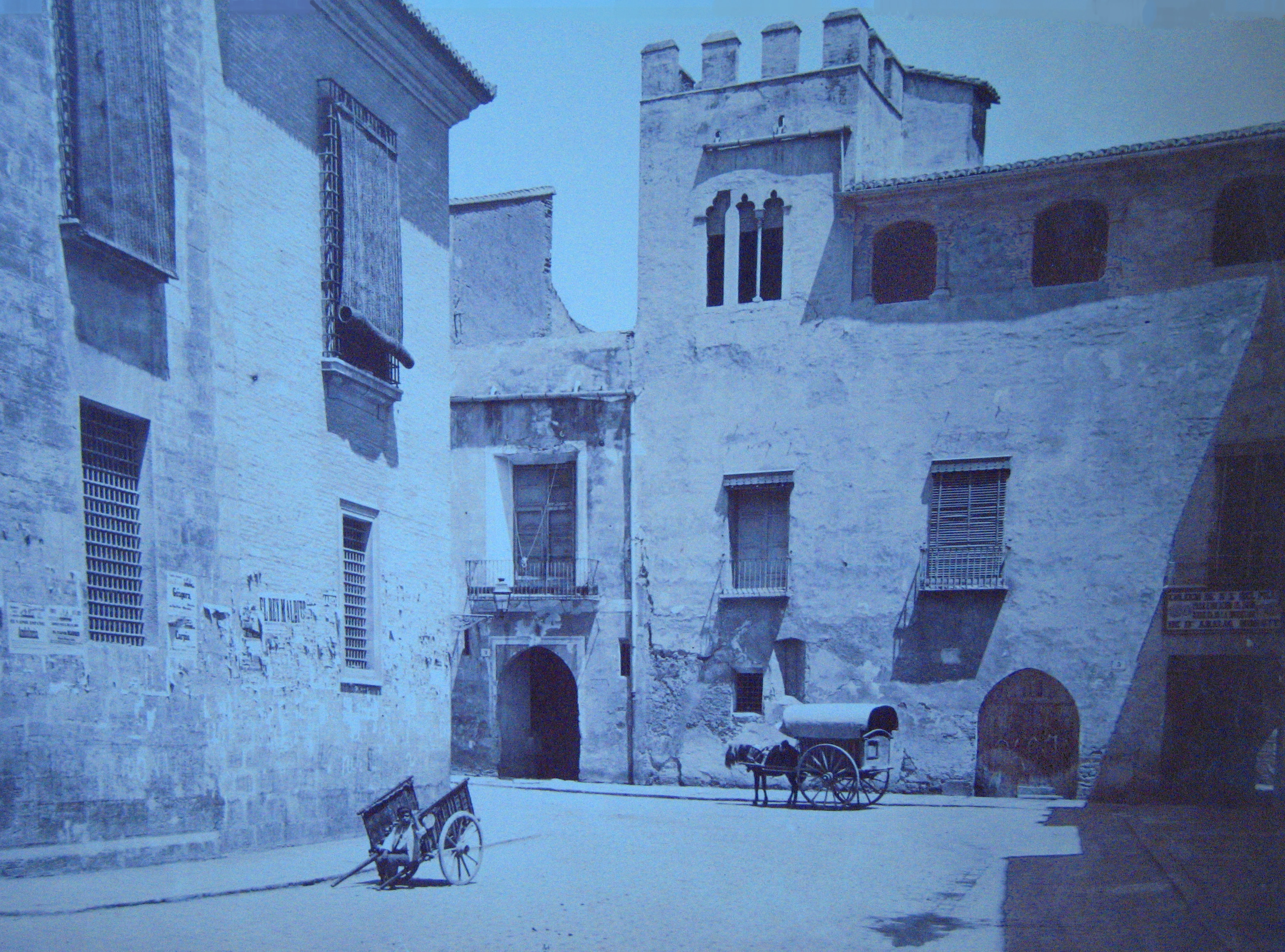 l'Almoina (1906) de València